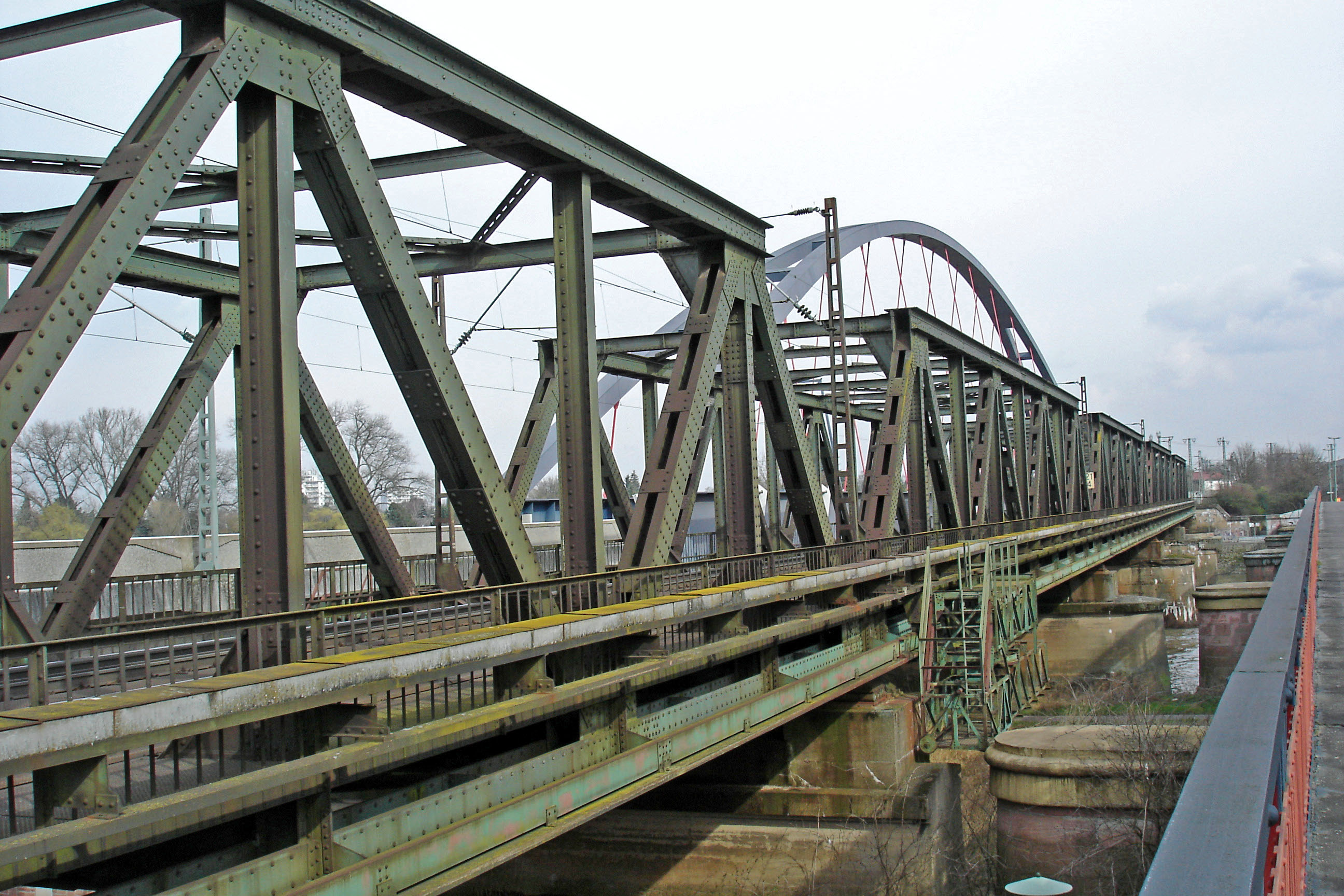 Steinheimer Bruecke (Bahnseite) von suedlicher Steinheimer Seite aus